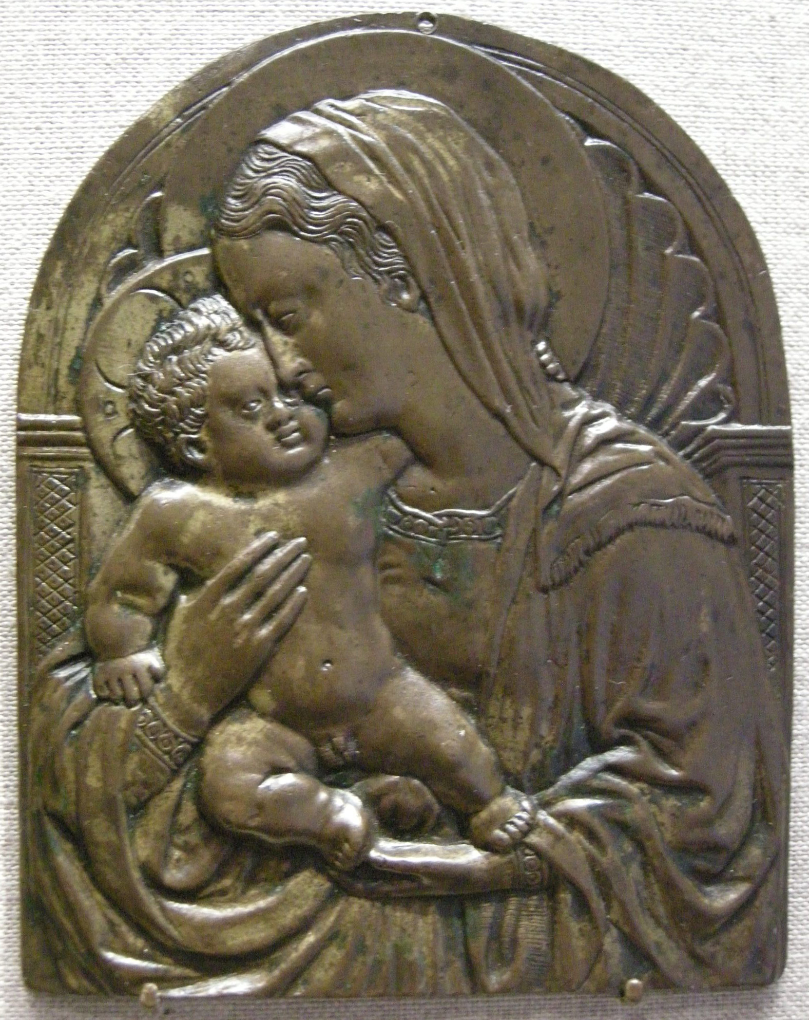 Michelozzo, madonna col bambino sotto una nicchia a conchiglia, 1427-30